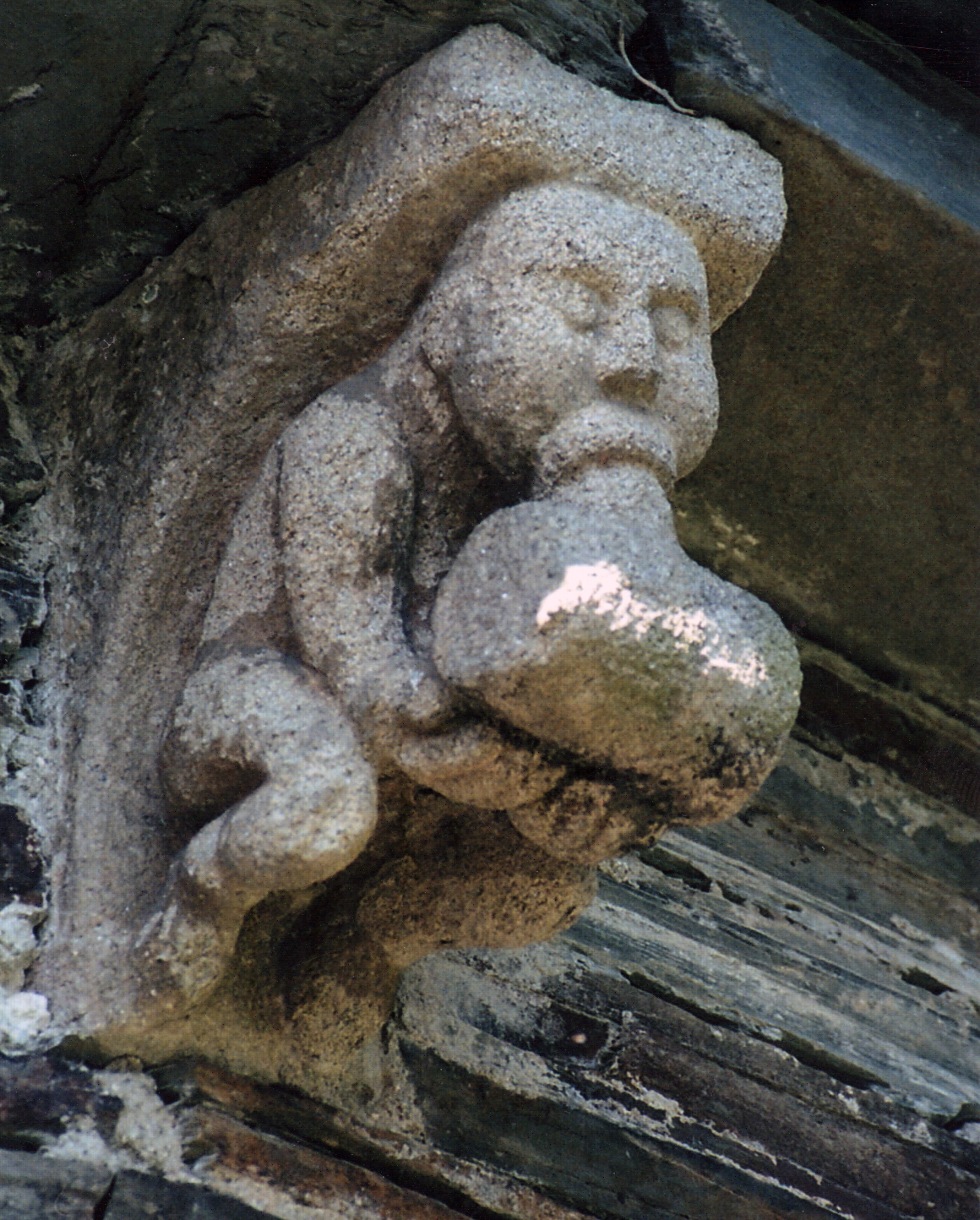 Canecillo de S. Román de Lousada (Samos)